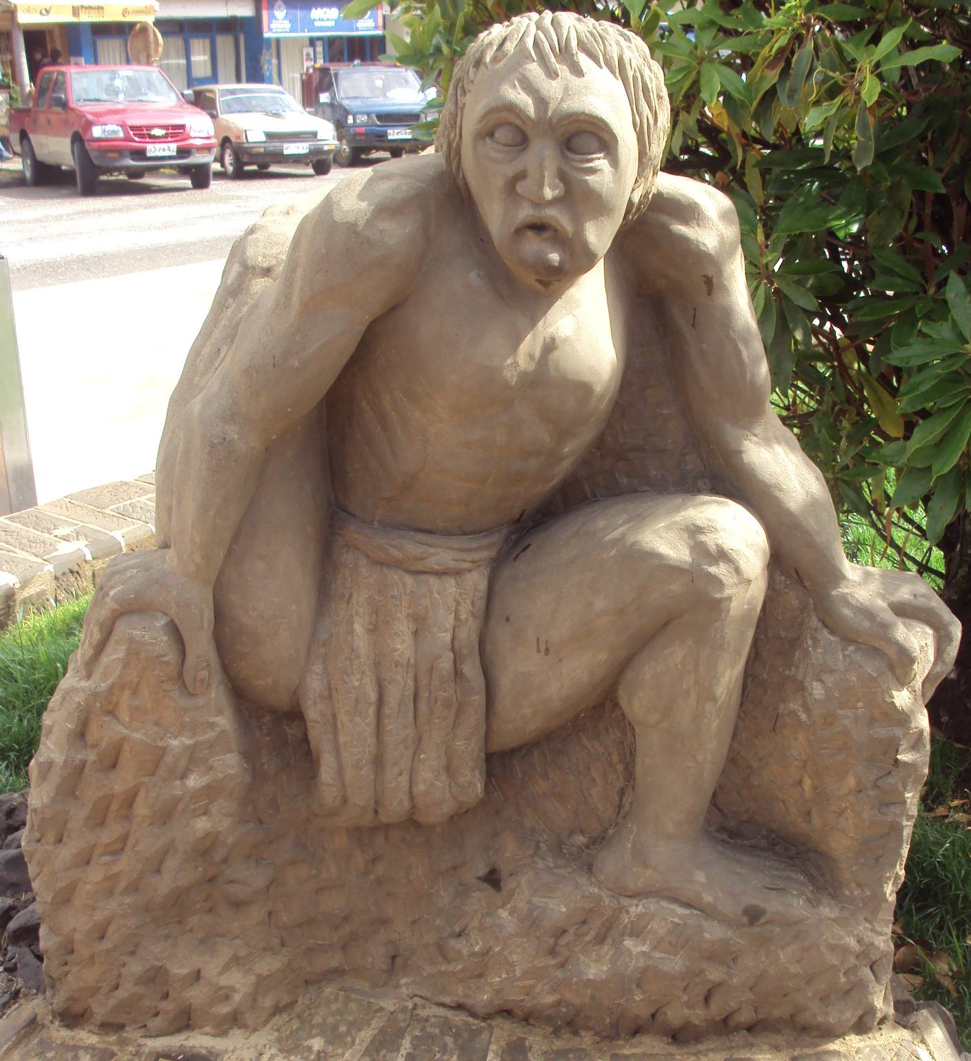 Estatua del Invunche en la Plaza de Ancud, Chile.